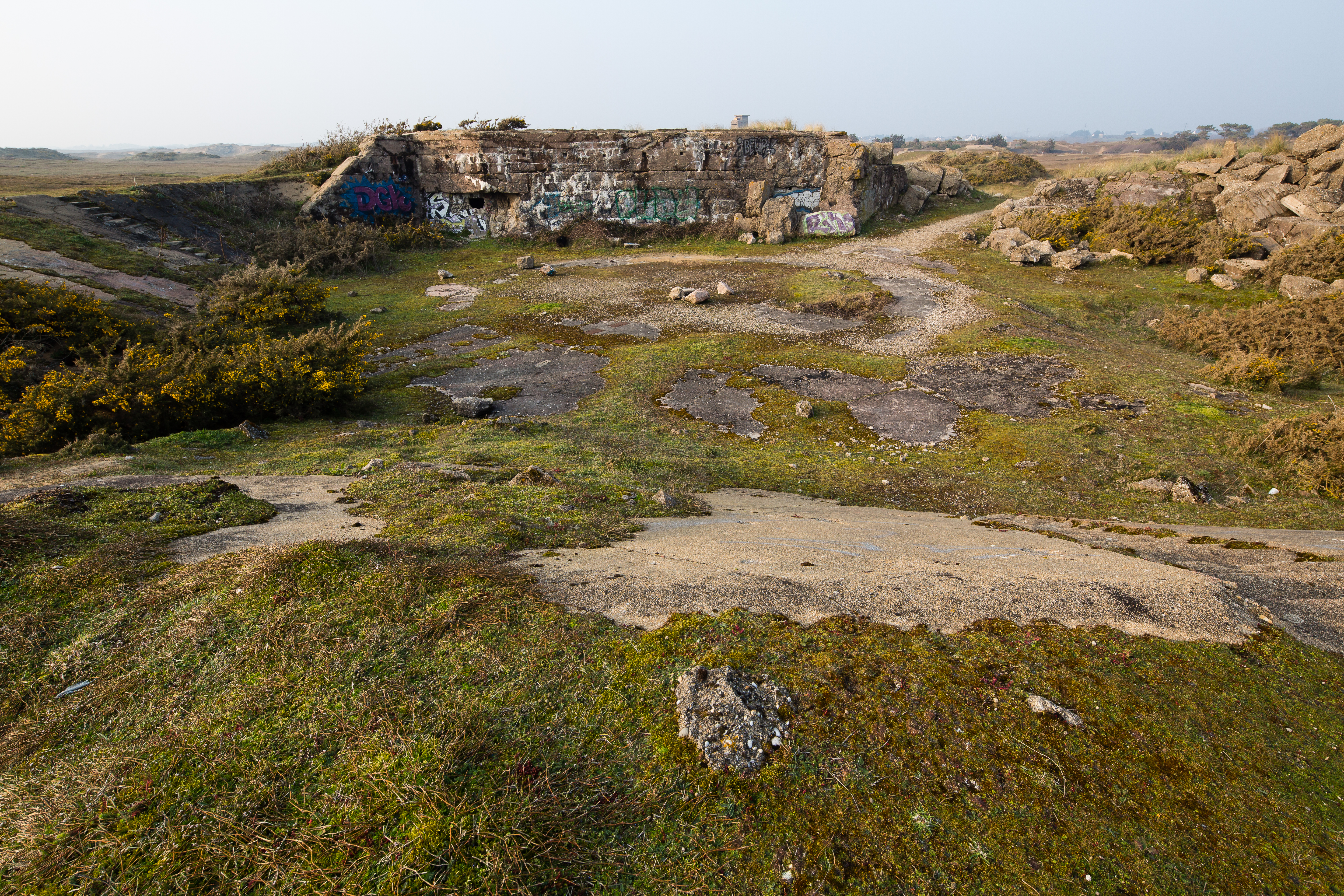 Encuvement sur le site du Bego à Plouharnel (France)